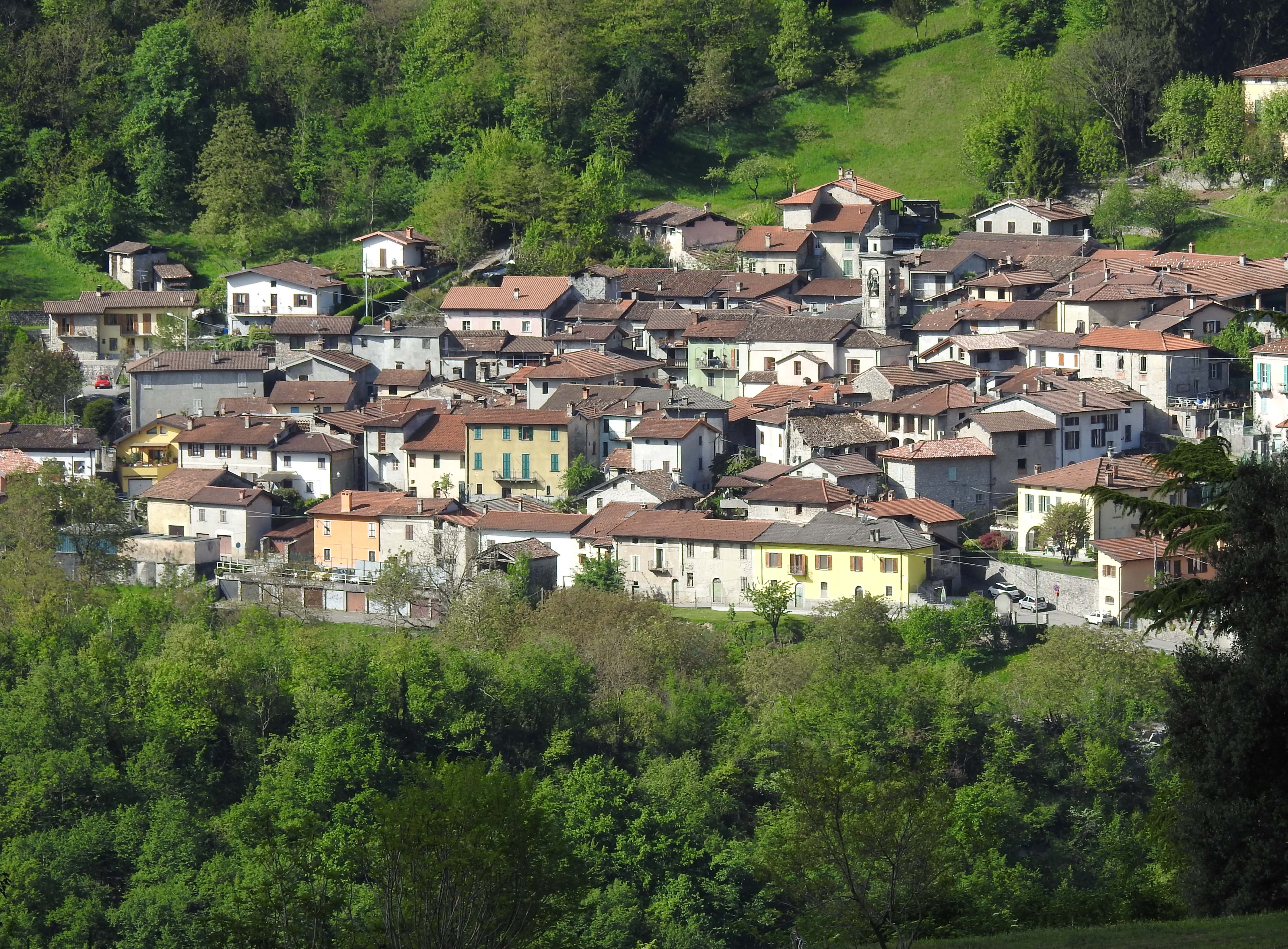 Grona von Nordosten, Grandola ed Uniti